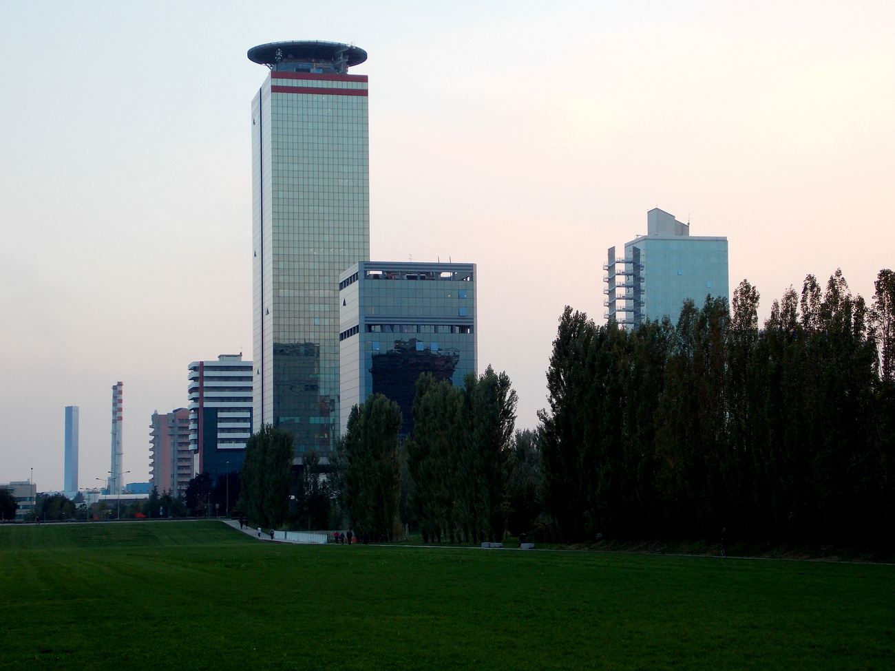 Rascacielos Crystal Palace de la ciudad de Brescia. Tiene un helipuerto en el tejado.